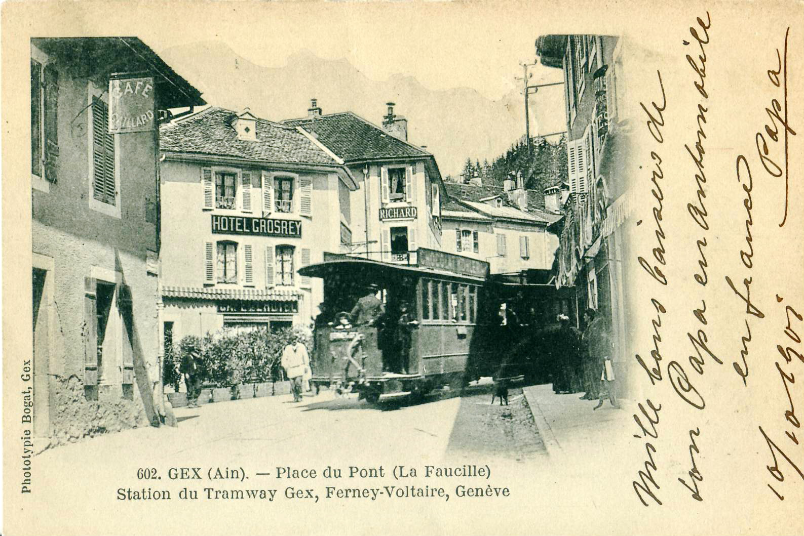 Carte postale ancienne éditée par Phototypie Bogat à Gex, n°602 :GEX - Place du Pont (La Faucille) - Station du tramway Gex, Ferney-Voltaire, Genève